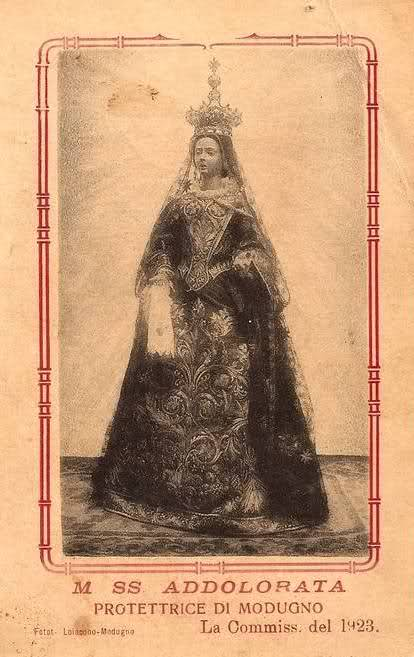 Cartolina rappresentante la statua della Madonna Addolorata conservata nella Chiesa Matrice di Modugno. la cartolina è stata pubblicata in occasione dei festeggiamenti della protettrice cittadina del 10 marzo 1923